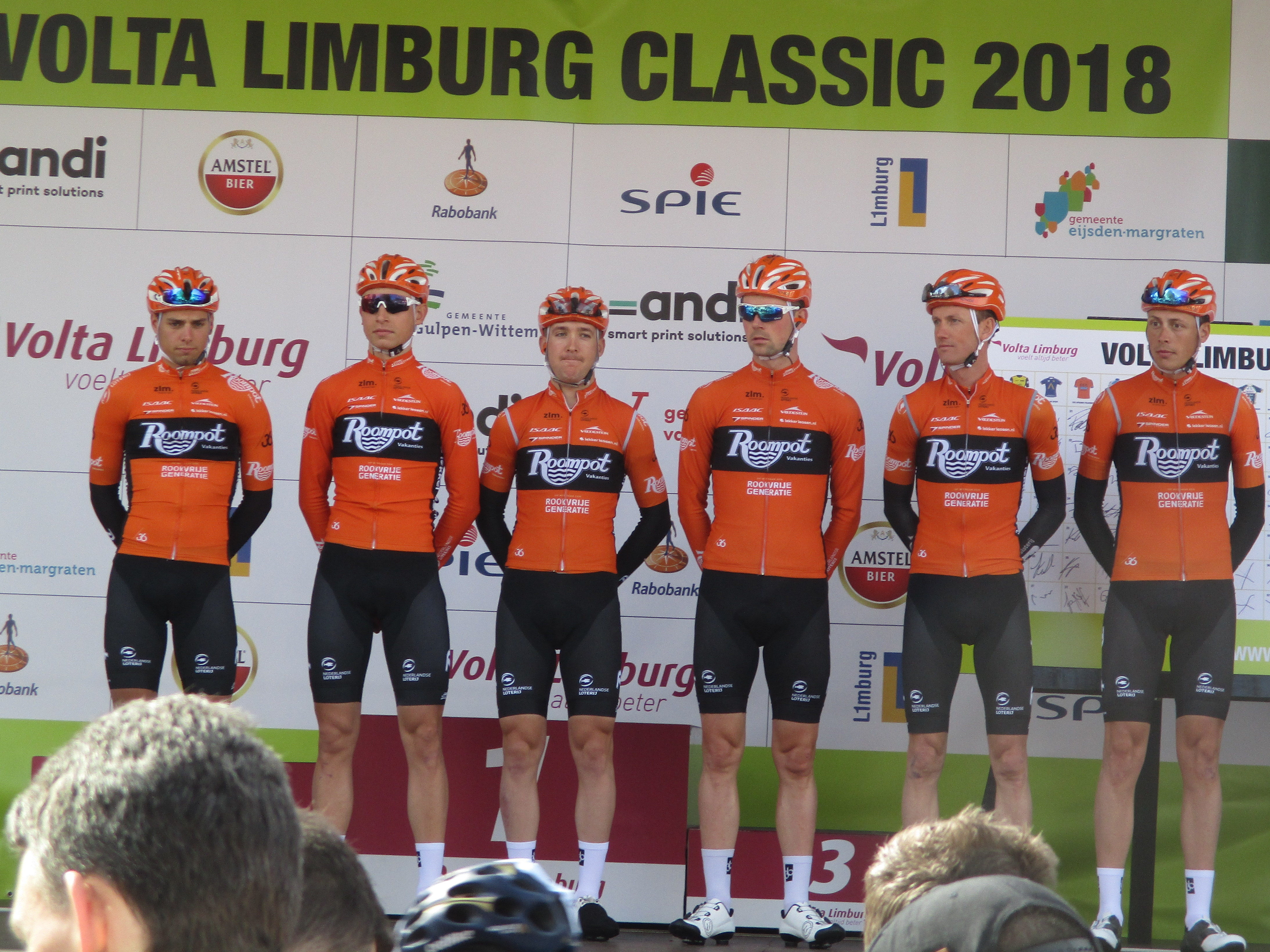 Start van de Volta Limburg Classic 2018 in de Diepstraat in Eijsden